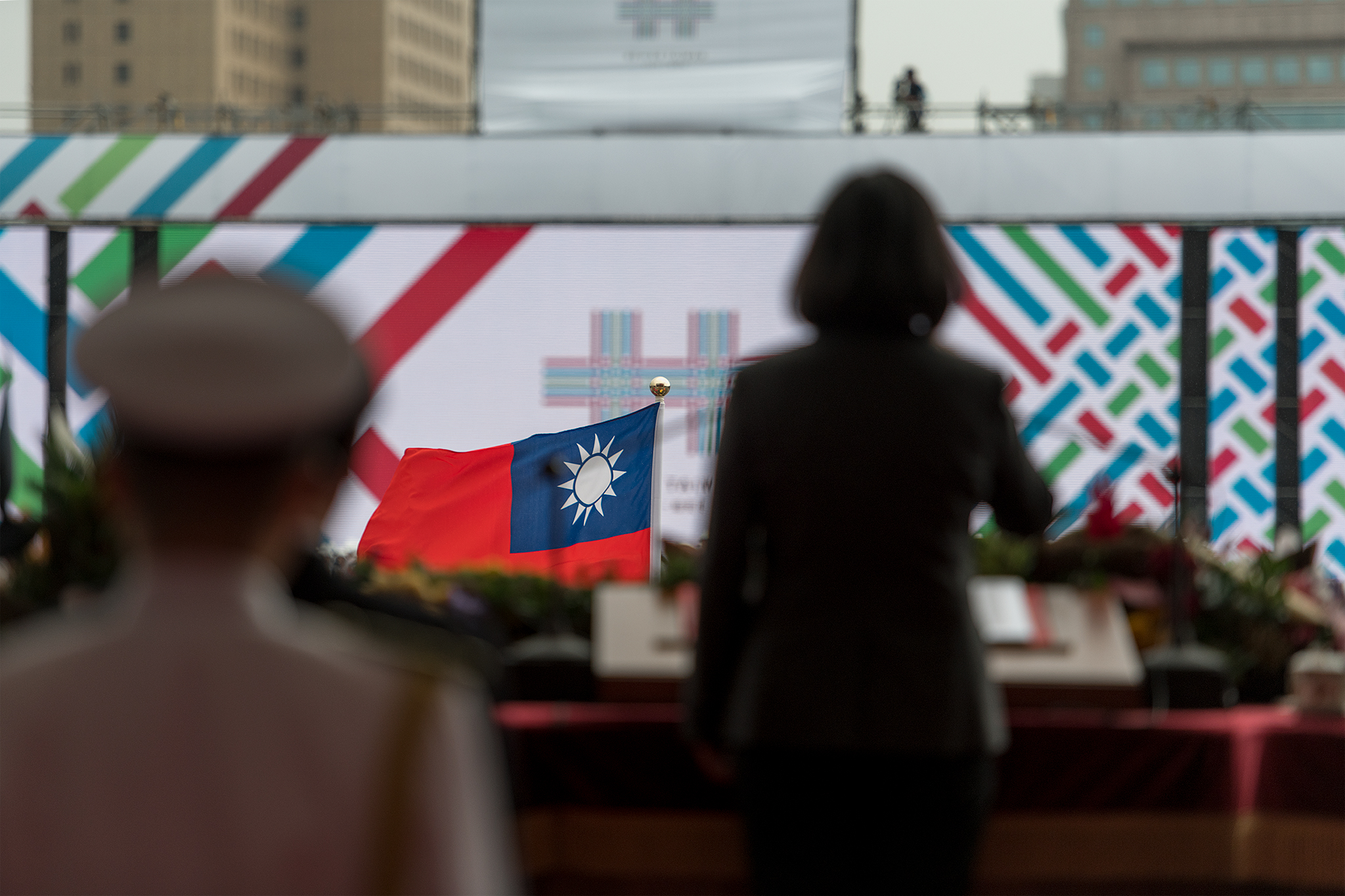 蔡英文於中華民國106年國慶日